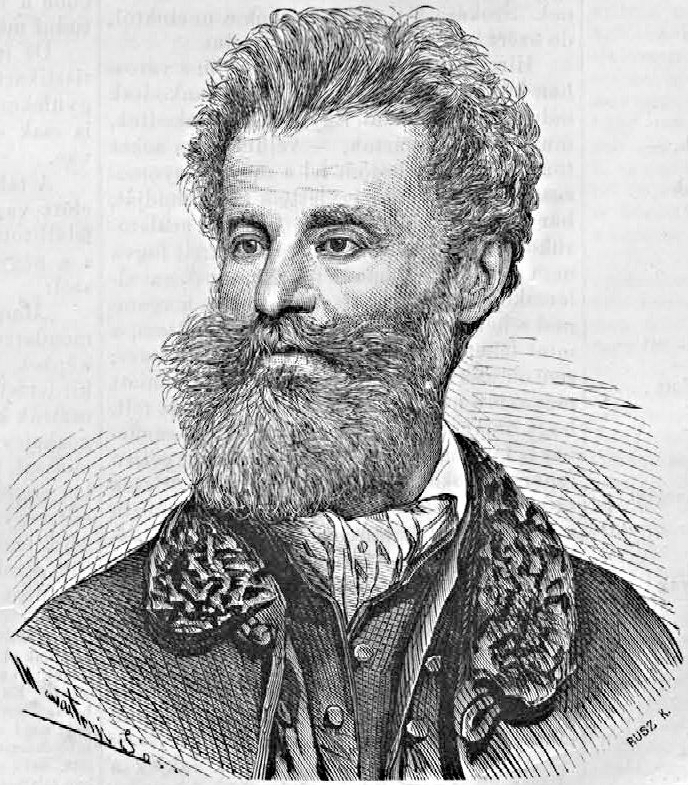 Lukács Dénes (1816–1868) honvéd ezredes. Rusz Károly metszete Marastoni József litográfiája alapján (Vasárnapi Ujság, 1867. július 7.)